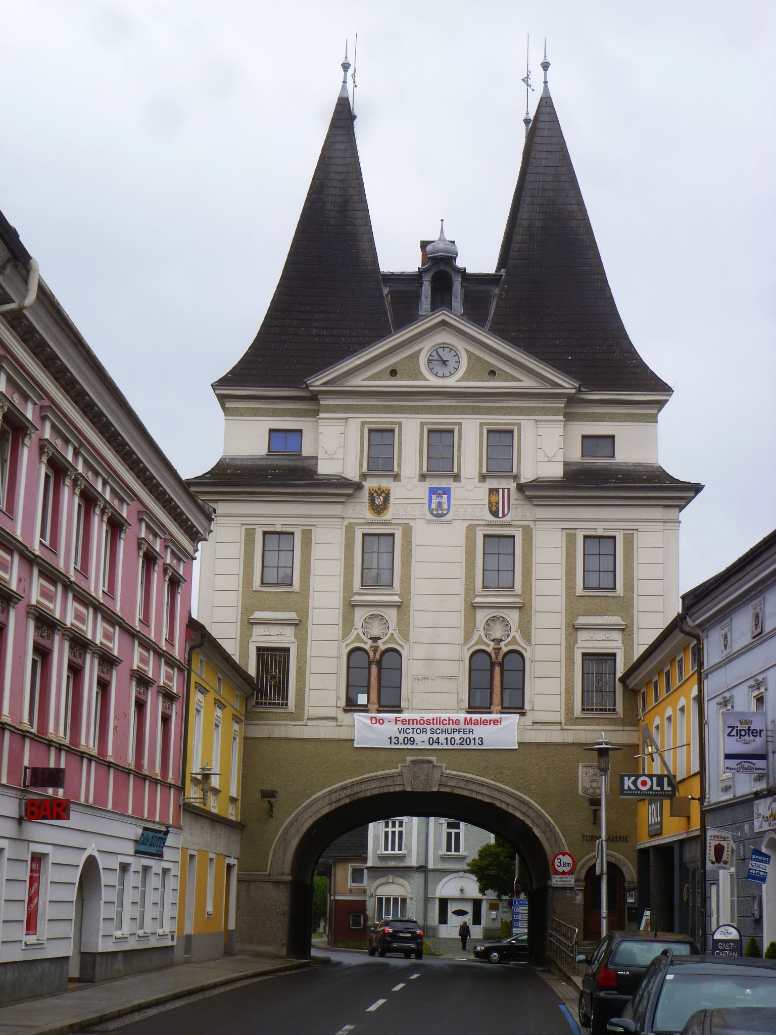 Stadtturm Schwanenstadt - Innen